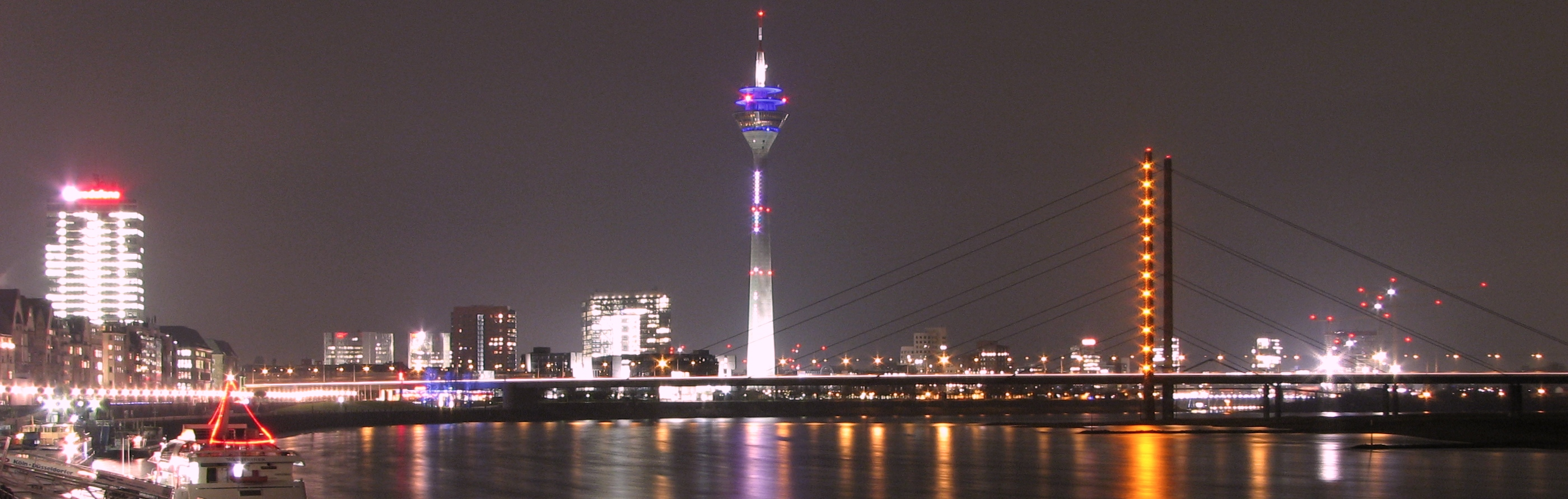 Rheinuferpromenade Düsseldorf bei Nacht - November 2008